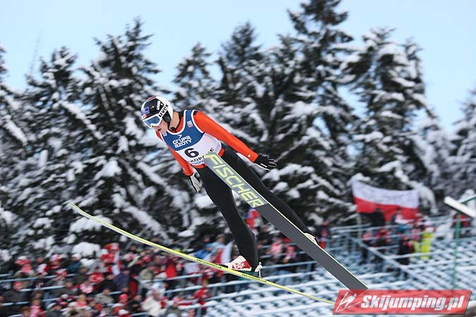 Puchar Świata w Zakopanem 2012/2013 – konkurs indywidualny (12 stycznia 2013)